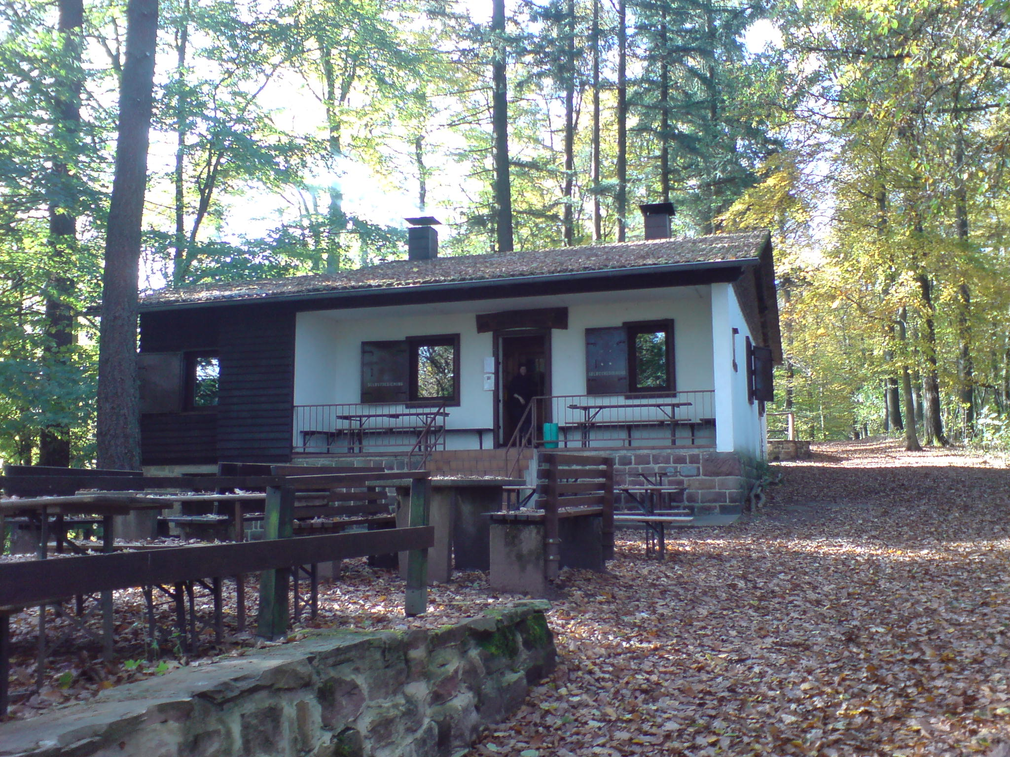 Die Heinrich-Kohl-Hütte auf dem Großen Stiefel bei St. Ingbert.